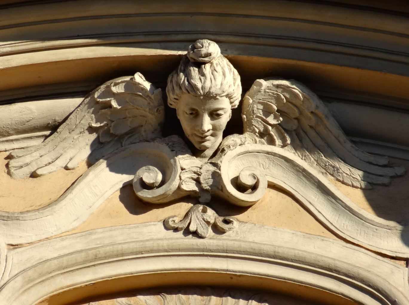 Kamienica przy ul. Gdańskiej 63 w Bydgoszczy - róg ul. Cieszkowskiego